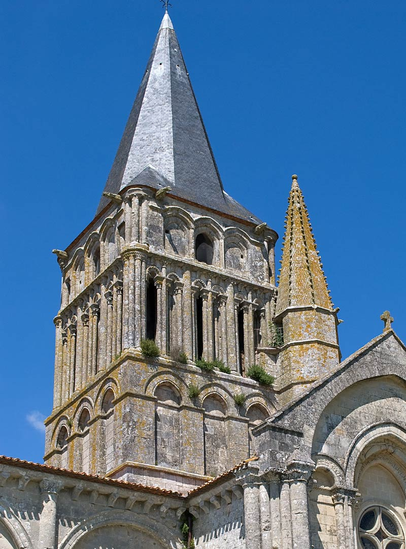 Vue du clocher